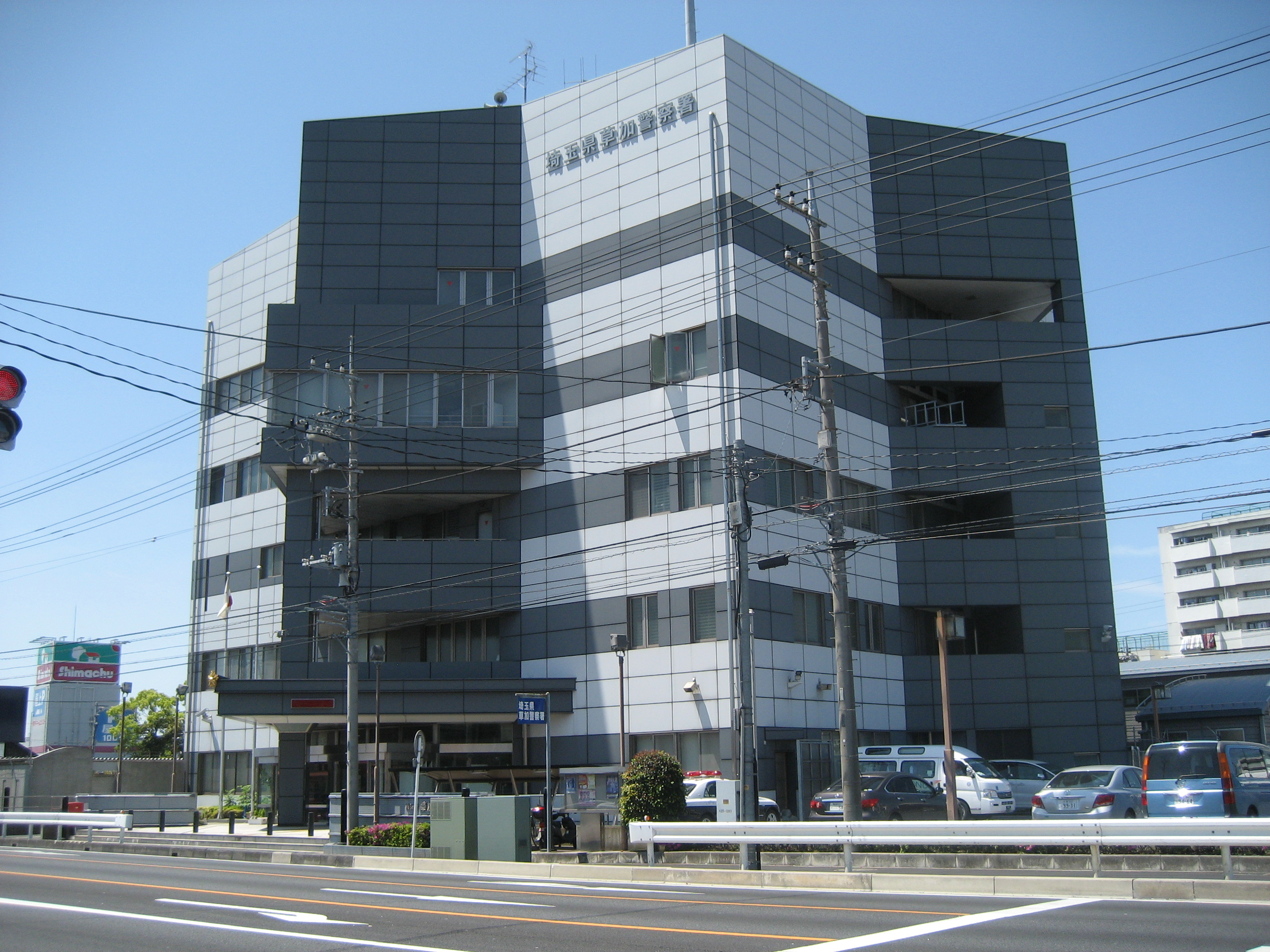 埼玉県草加警察署庁舎